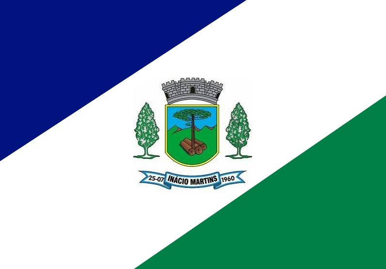 Bandeira do município de Inácio Martins - PR